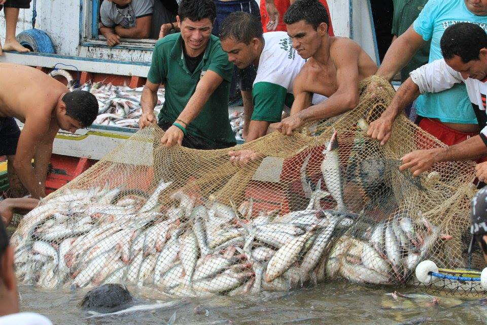 miri